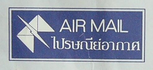 Airmail (Post of Thailand), N.B. kein französischer Schriftzug.